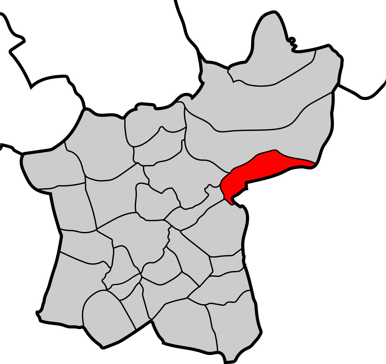 Mapa parroquia de San Miguel de Neira de Rei Baralla